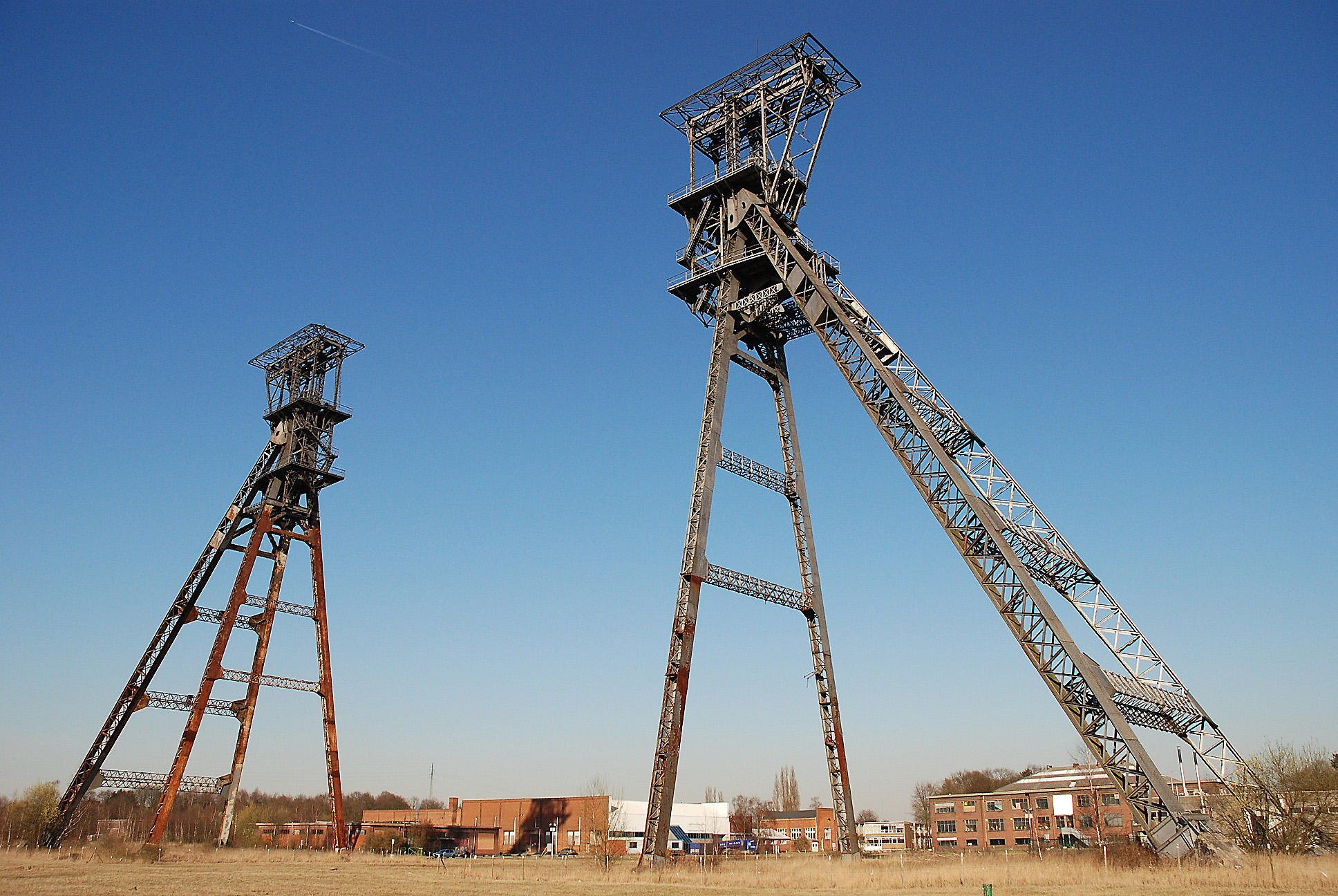 Schachtbokken van de gesloten steenkoolmijn te Houthalen, België